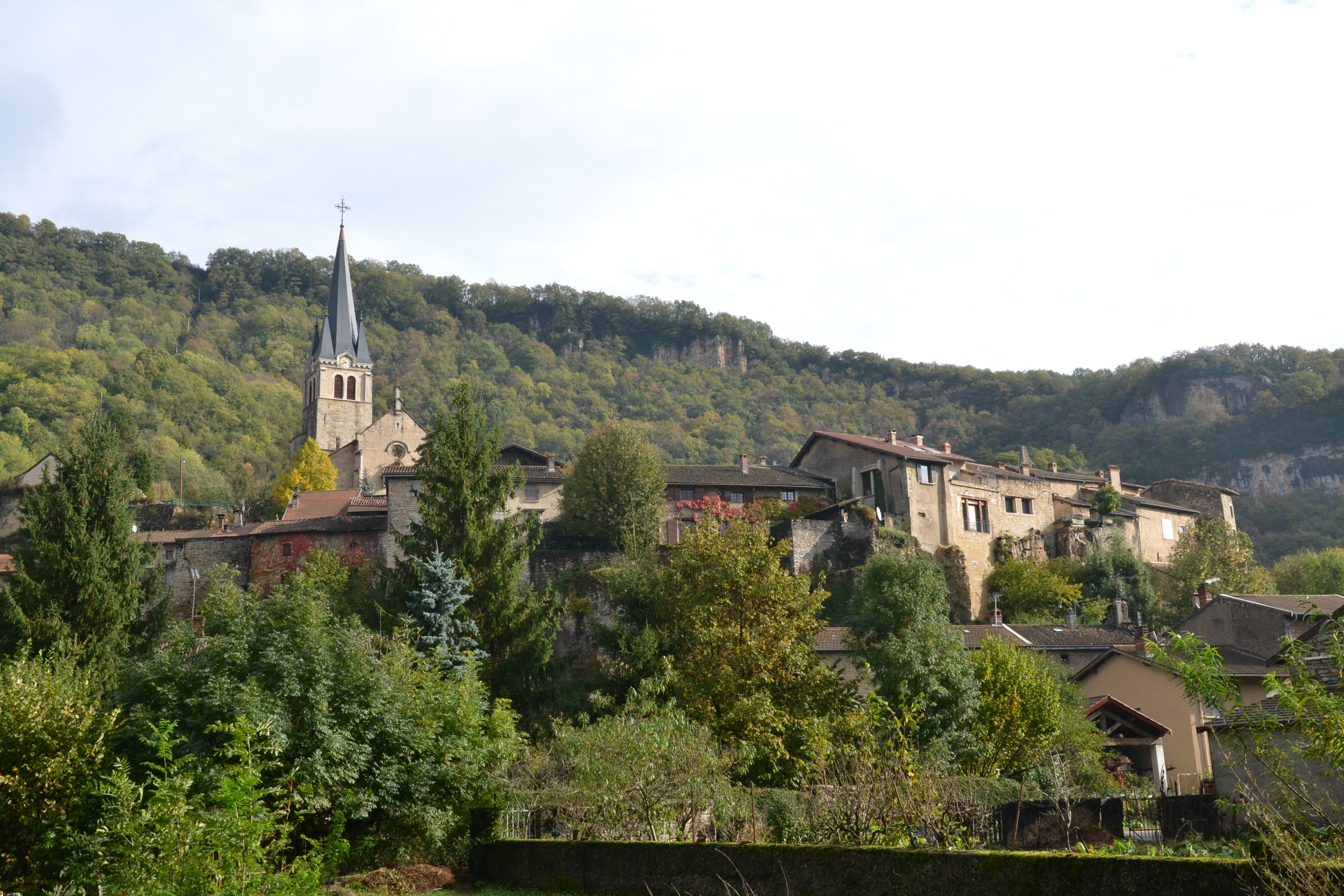 Le village de Saint-Sorlin-en-Bugey (Ain, France)